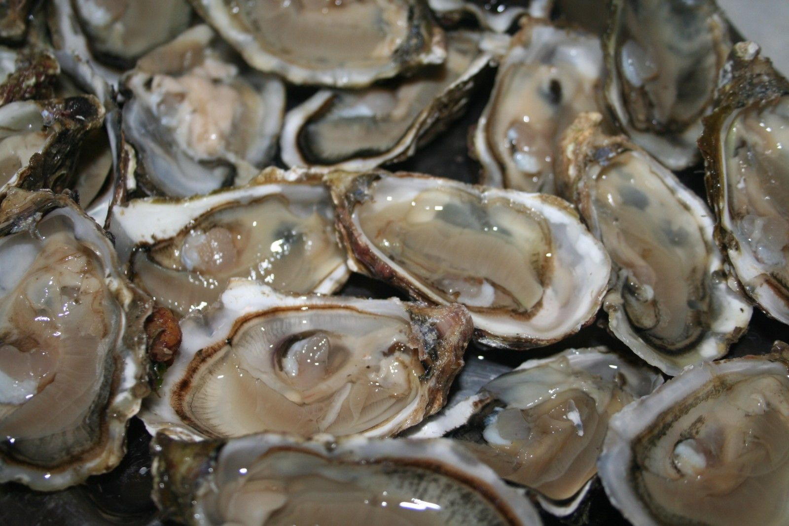 huitres